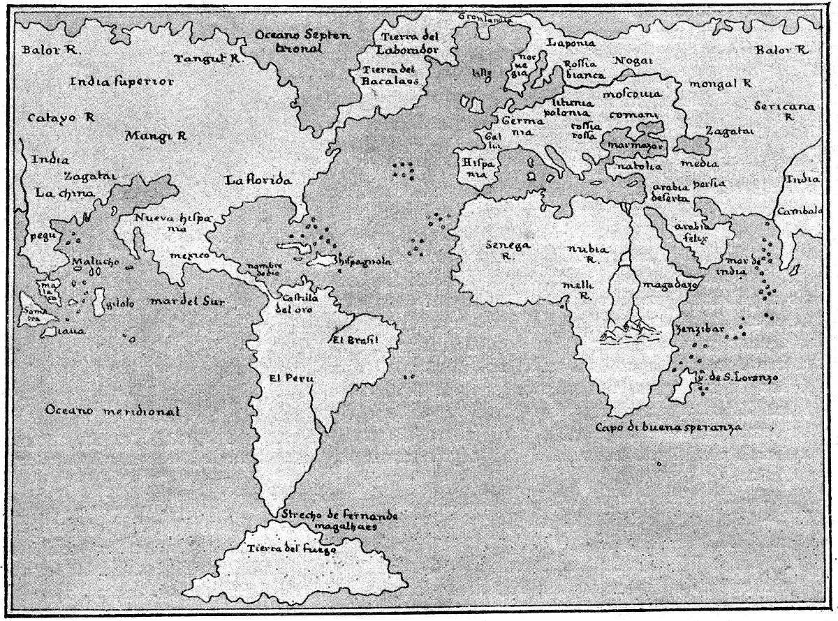 Weltkarte, basierend auf Gastaldis Weltkarte von 1548 in "Atlas Geographia CL Ptolemaei Alexandrini", Venedig 1548